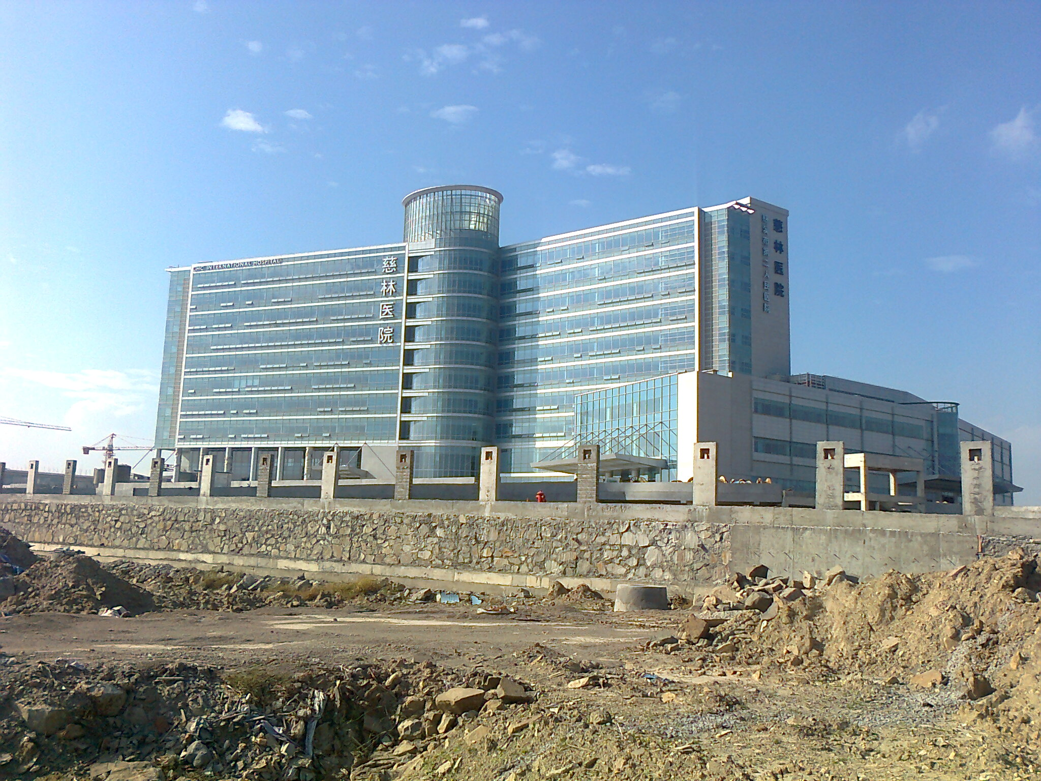 慈林医院（慈溪市第二人民医院）建造中。